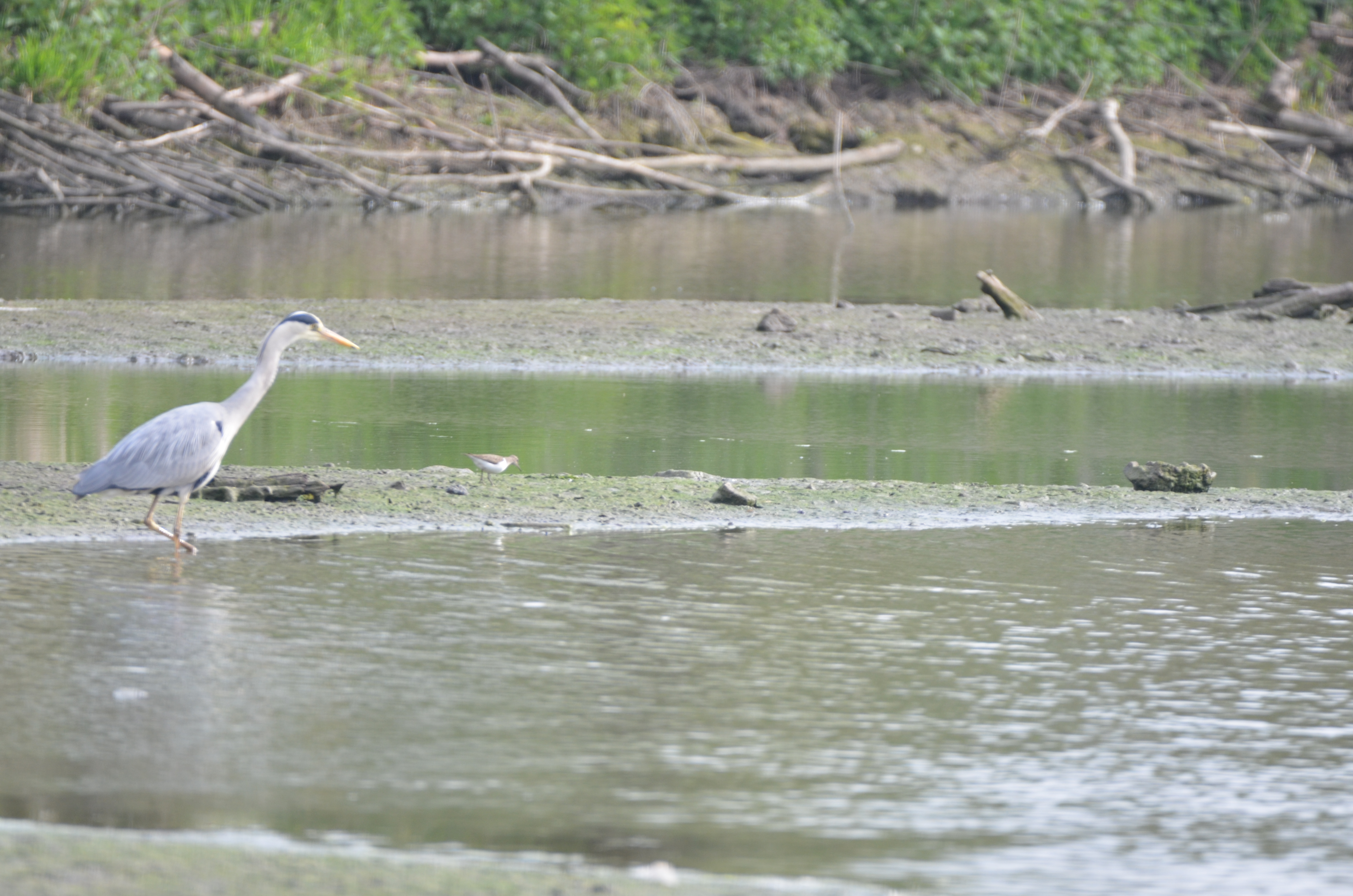 Héron cendré et Chevalier guignette observés au marais de la Marque